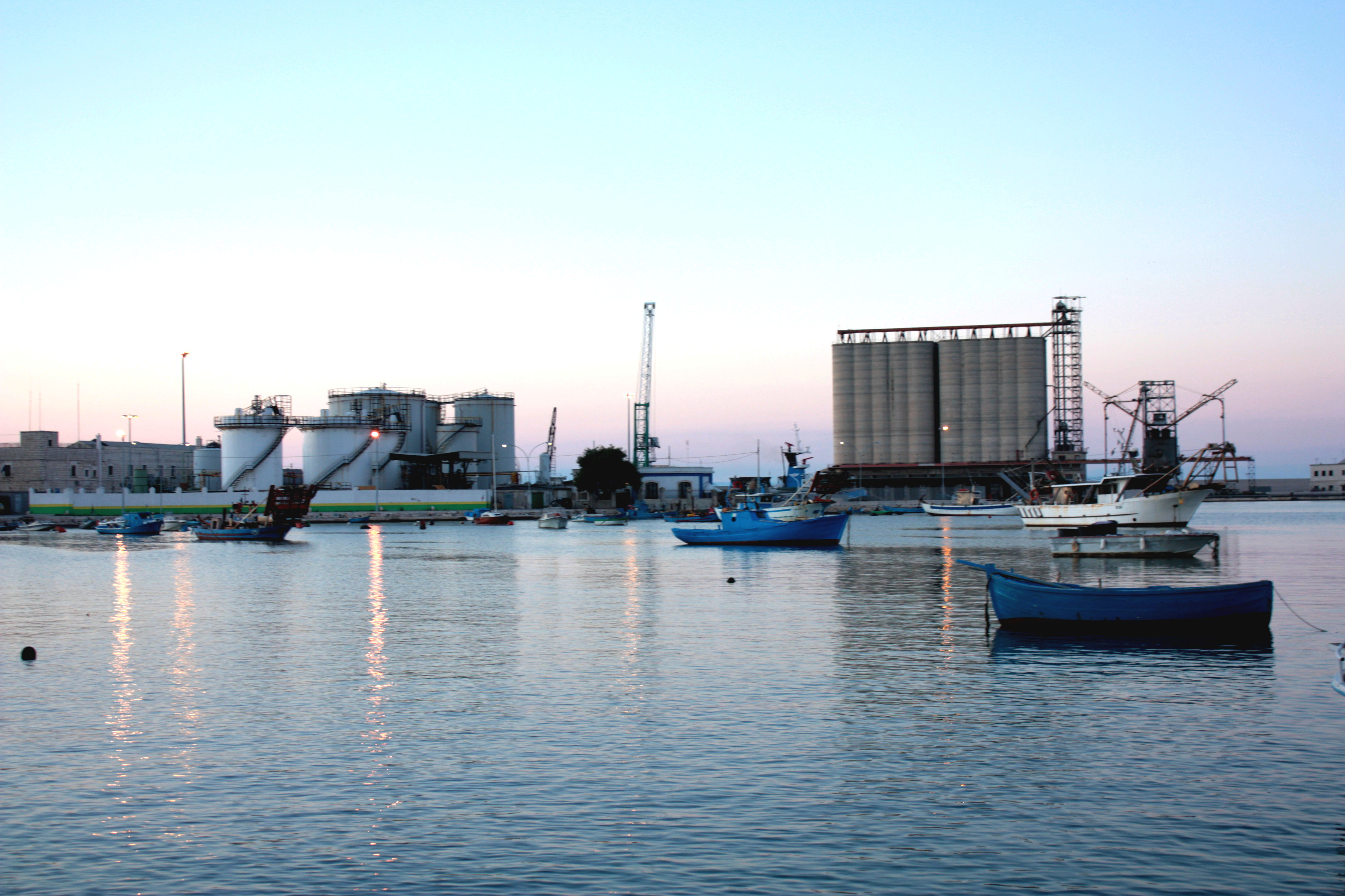 Porto di Barletta: la darsena dei pescatori vista dall'isola